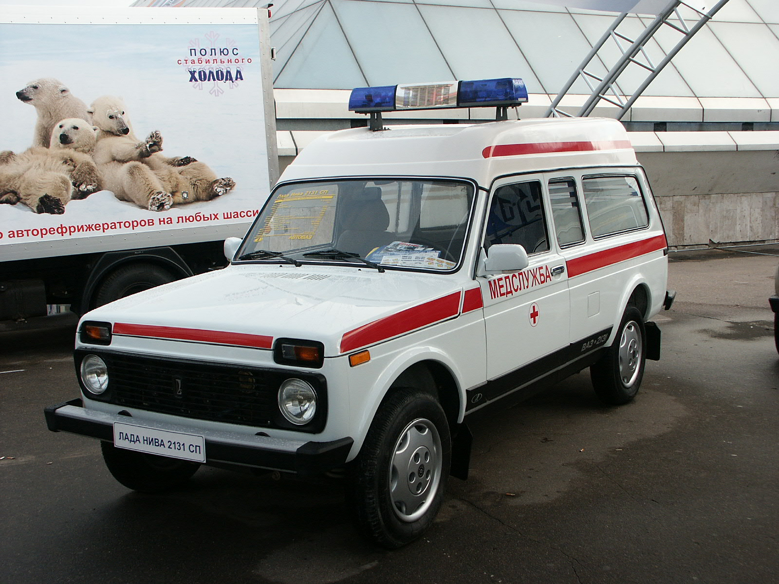 Санитарный ВАЗ-2131СП (213105) производства фирмы ЛАДА-ТУЛ